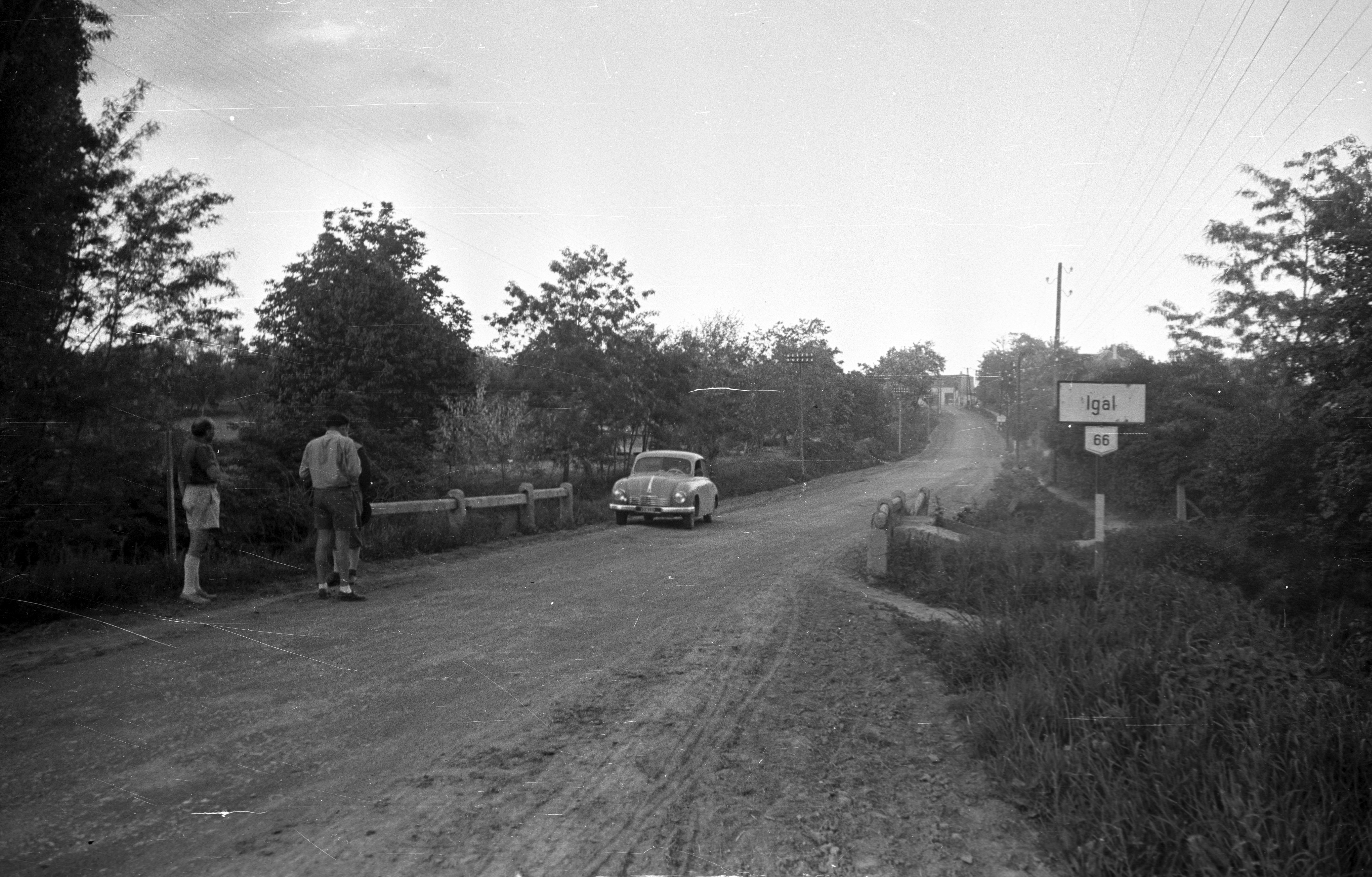 Kaposvári utca. Location: Hungary, Igal Tags: Tatra-brand, Czechoslovak brand, automobile, place-name signs Title: Kaposvári utca.